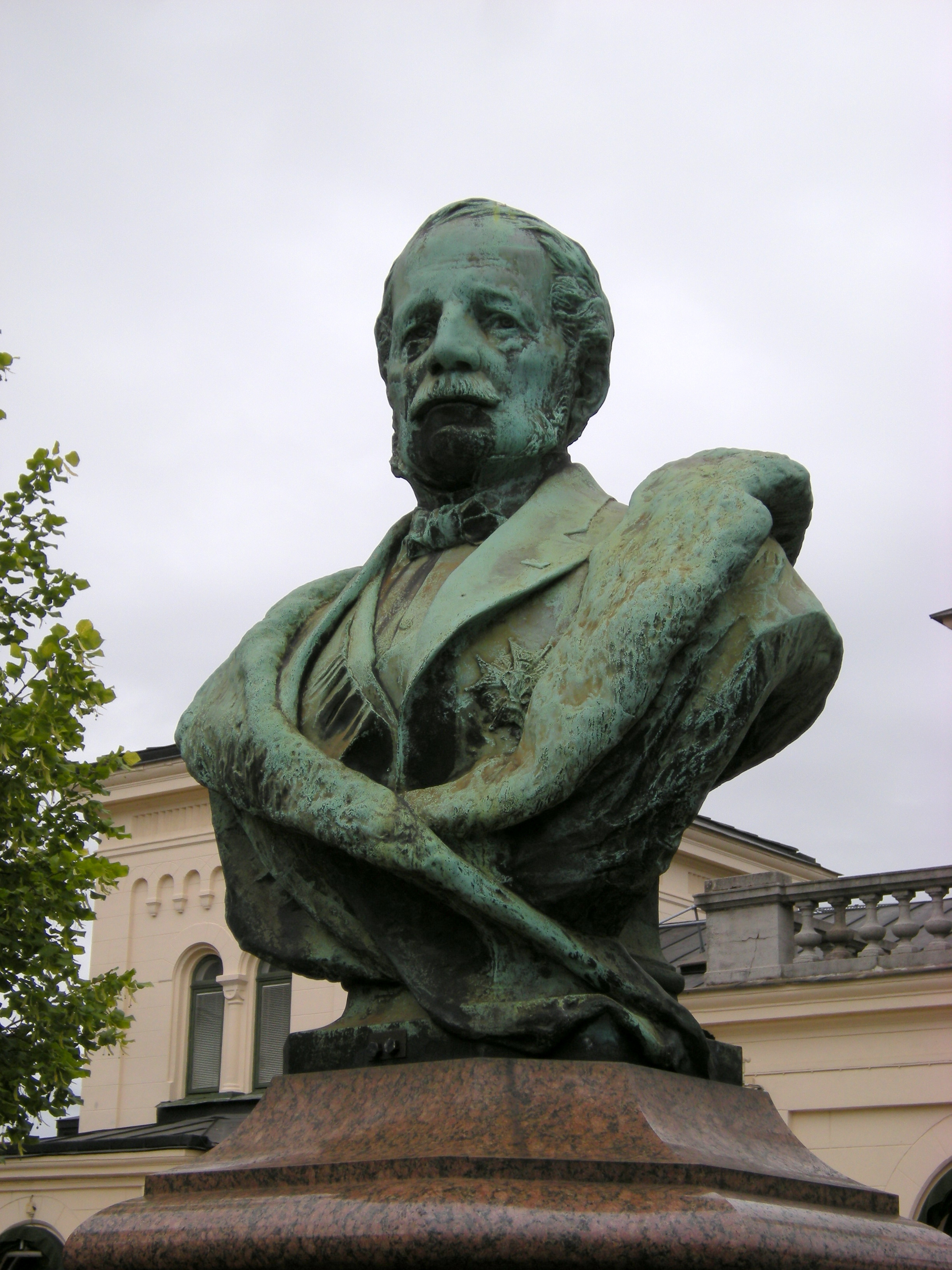 Adolf Eugène von Rosen, byst utanför centralstationen i Örebro